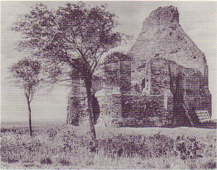 Kirchenruine Hoogelande (Walcheren)